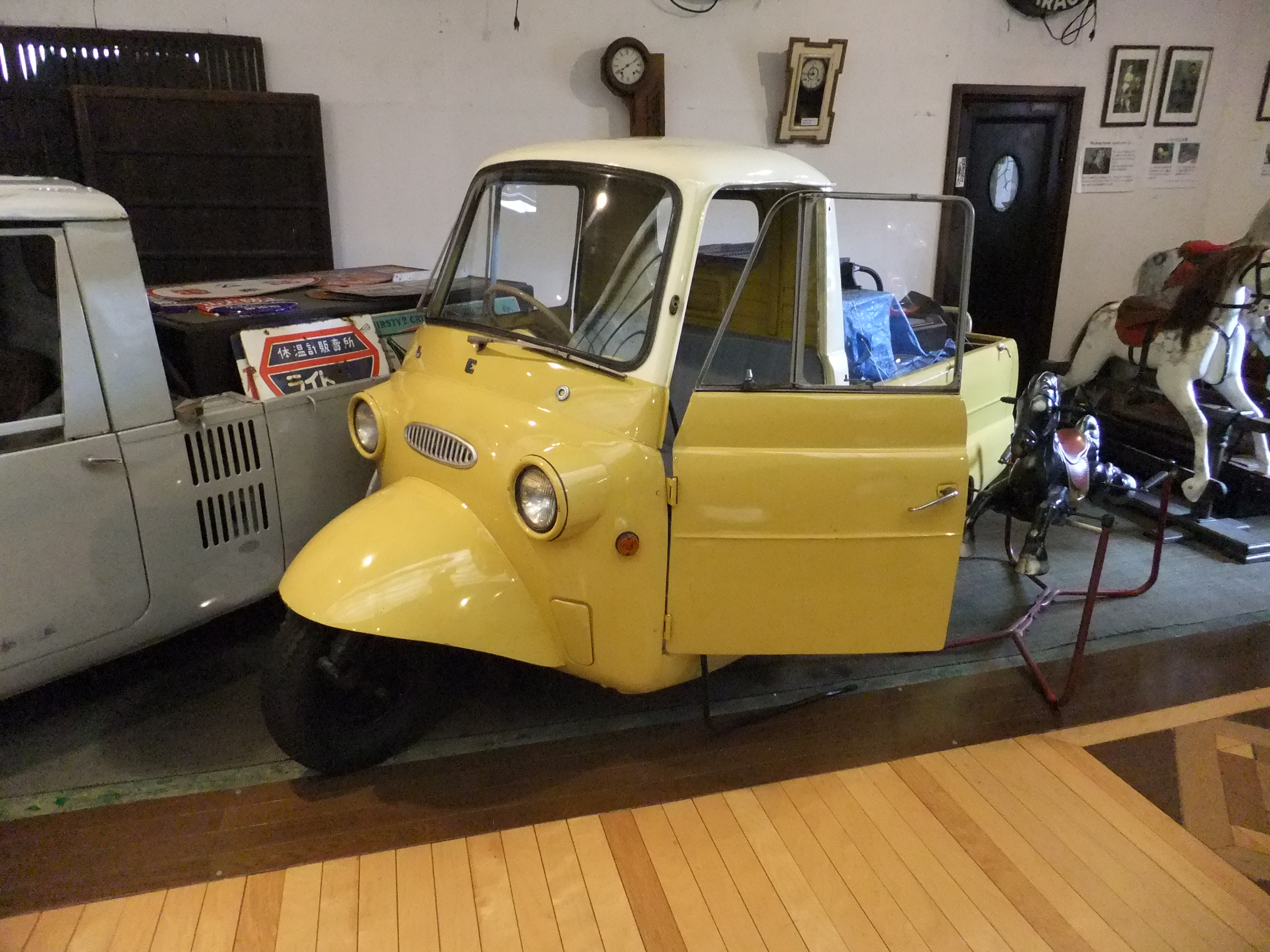 福山自動車時計博物館所蔵 三菱レオ